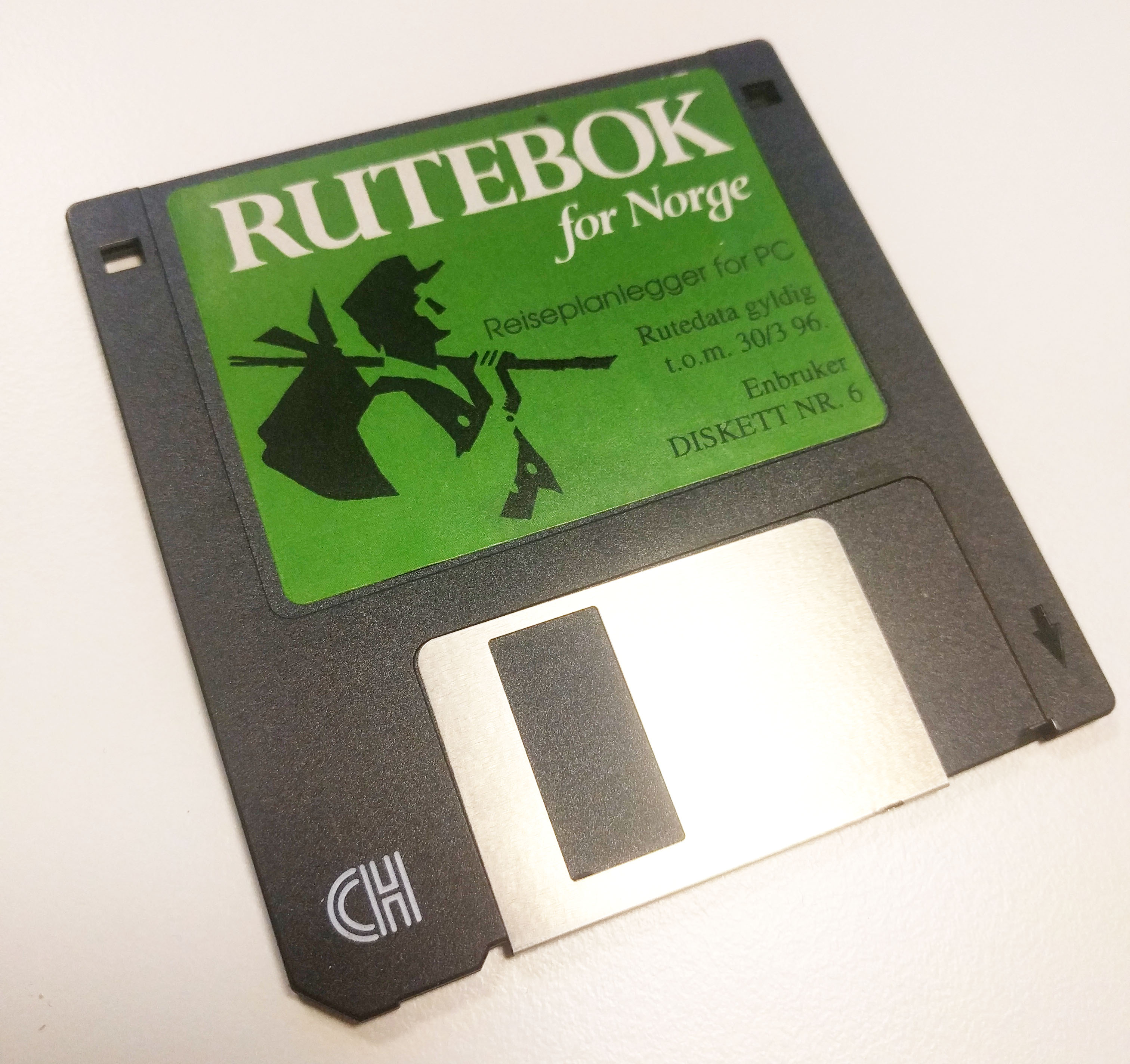 Rutebok for Norge, reiseplanlegger på PC. Diskett nr. 6 av 1996 års utgave gyldig fra 30. mars.